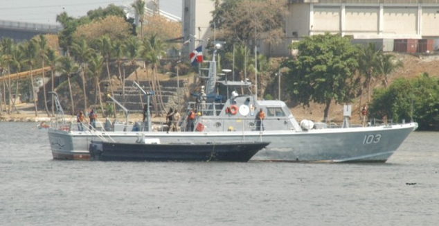 Guarda Costas Procion Marina de Guerra Dominicana